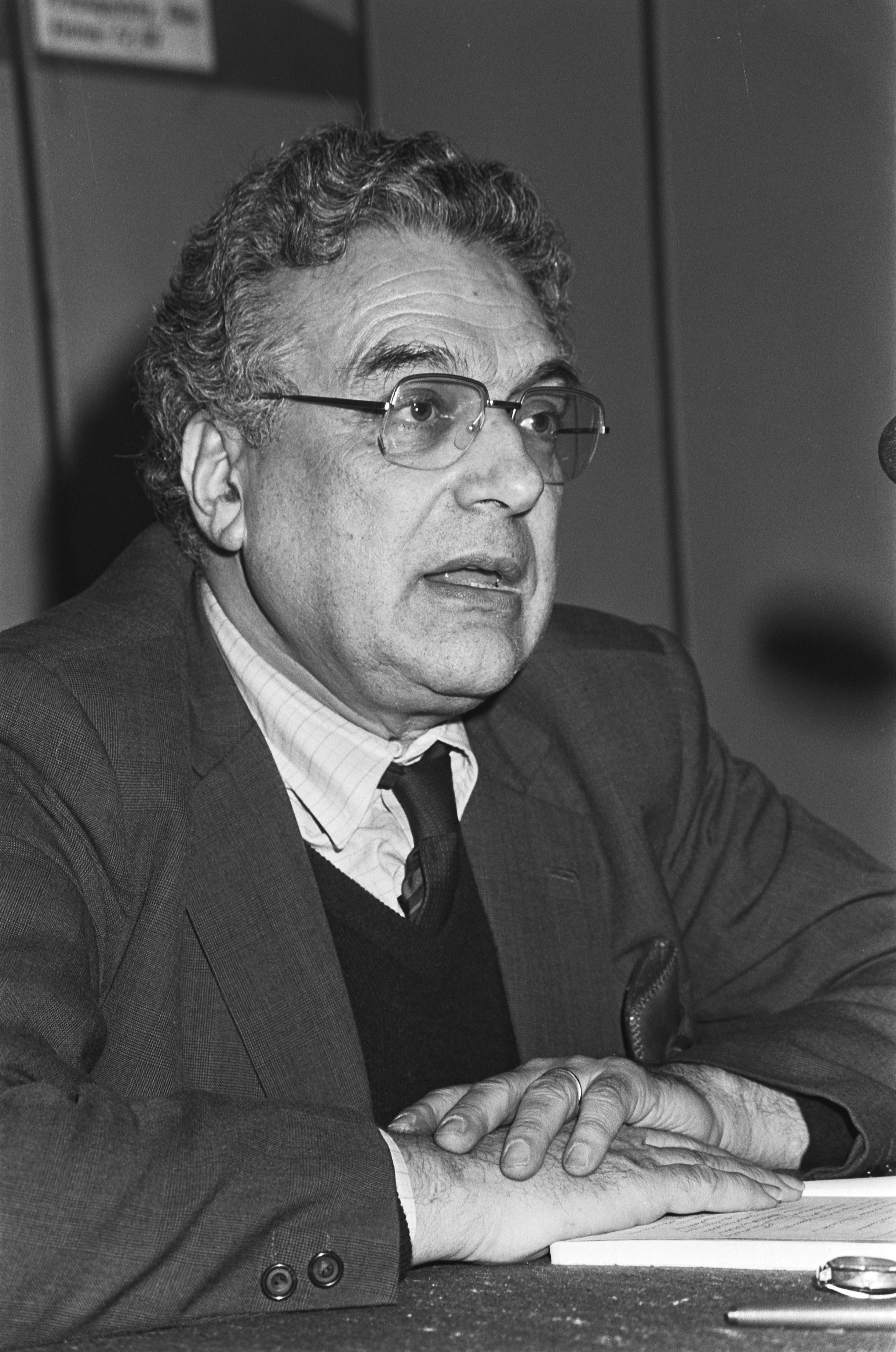 Collectie / Archief : Fotocollectie Anefo Reportage / Serie : [ onbekend ] Beschrijving : Debat tussen de econoom Ernest Mandel en Boe Thio ove linkse anti-crisisstrategie. Ernest Mandel Datum : 29 maart 1982 Trefwoorden : Debatten Persoonsnaam : Ernest Mandel Fotograaf : Dijk, Hans van / Anefo Auteursrechthebbende : Nationaal Archief Materiaalsoort : Negatief (zwart/wit) Nummer archiefinventaris : bekijk toegang 2.24.01.05 Bestanddeelnummer : 932-0763